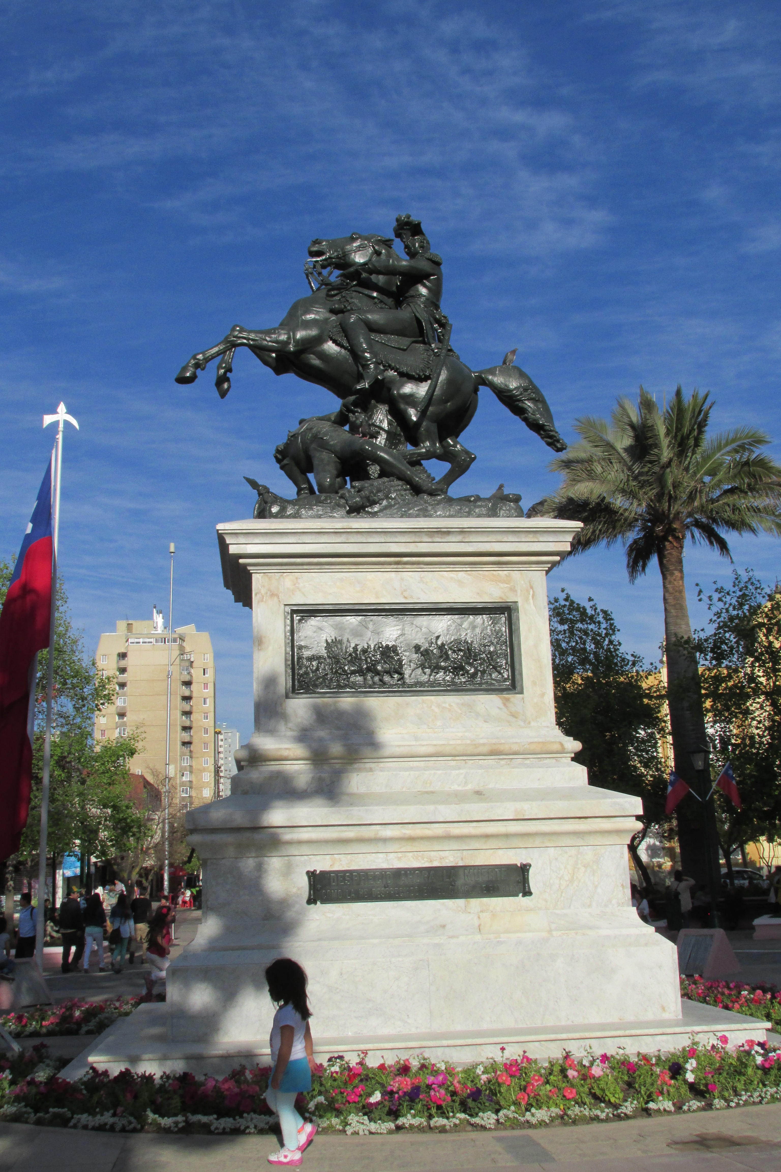 Monumento a Bernardo O"Higgins en Plaza Los Héroes Rancagua, restaurado al cumplir 100 años de su inaguración.